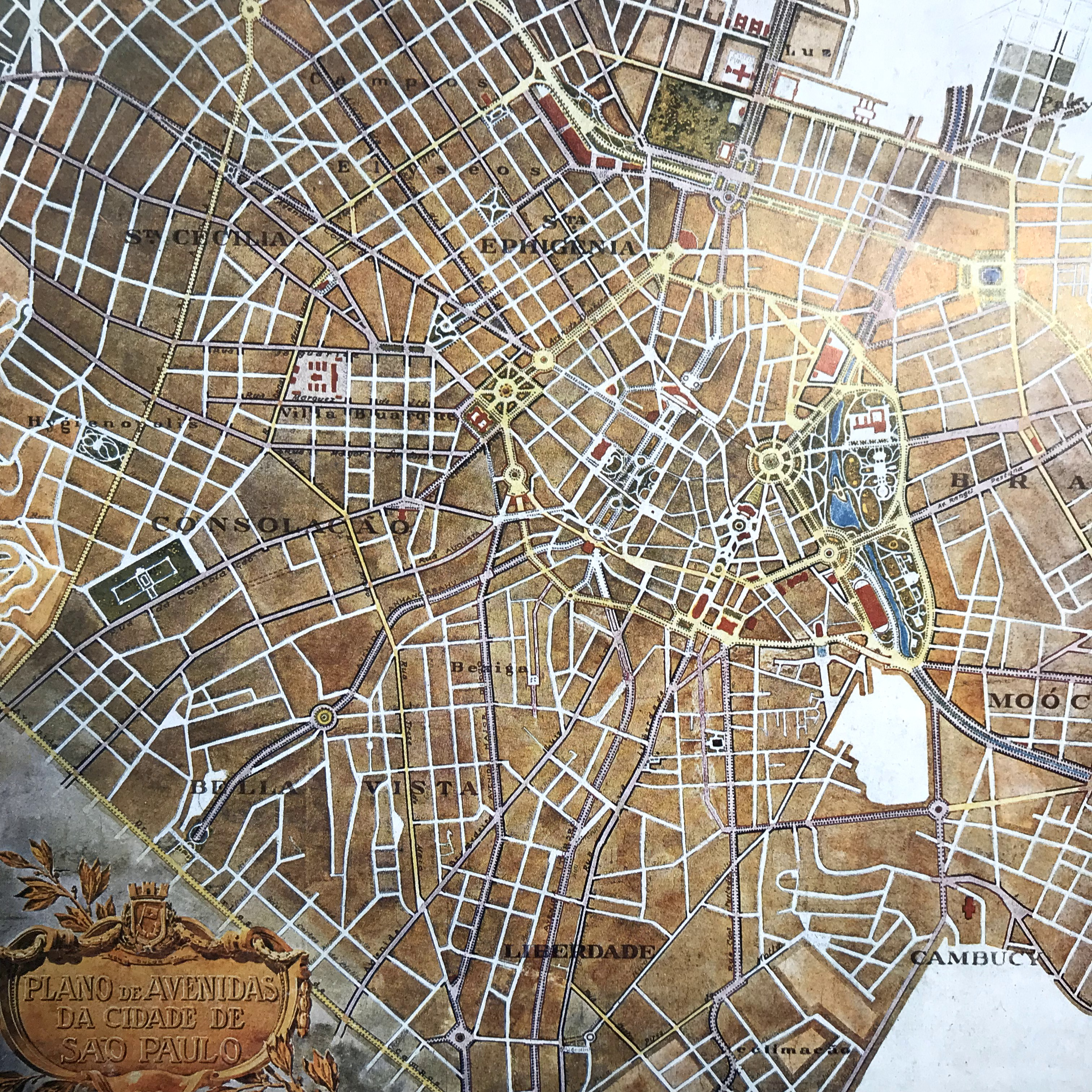 IMAGEM 7